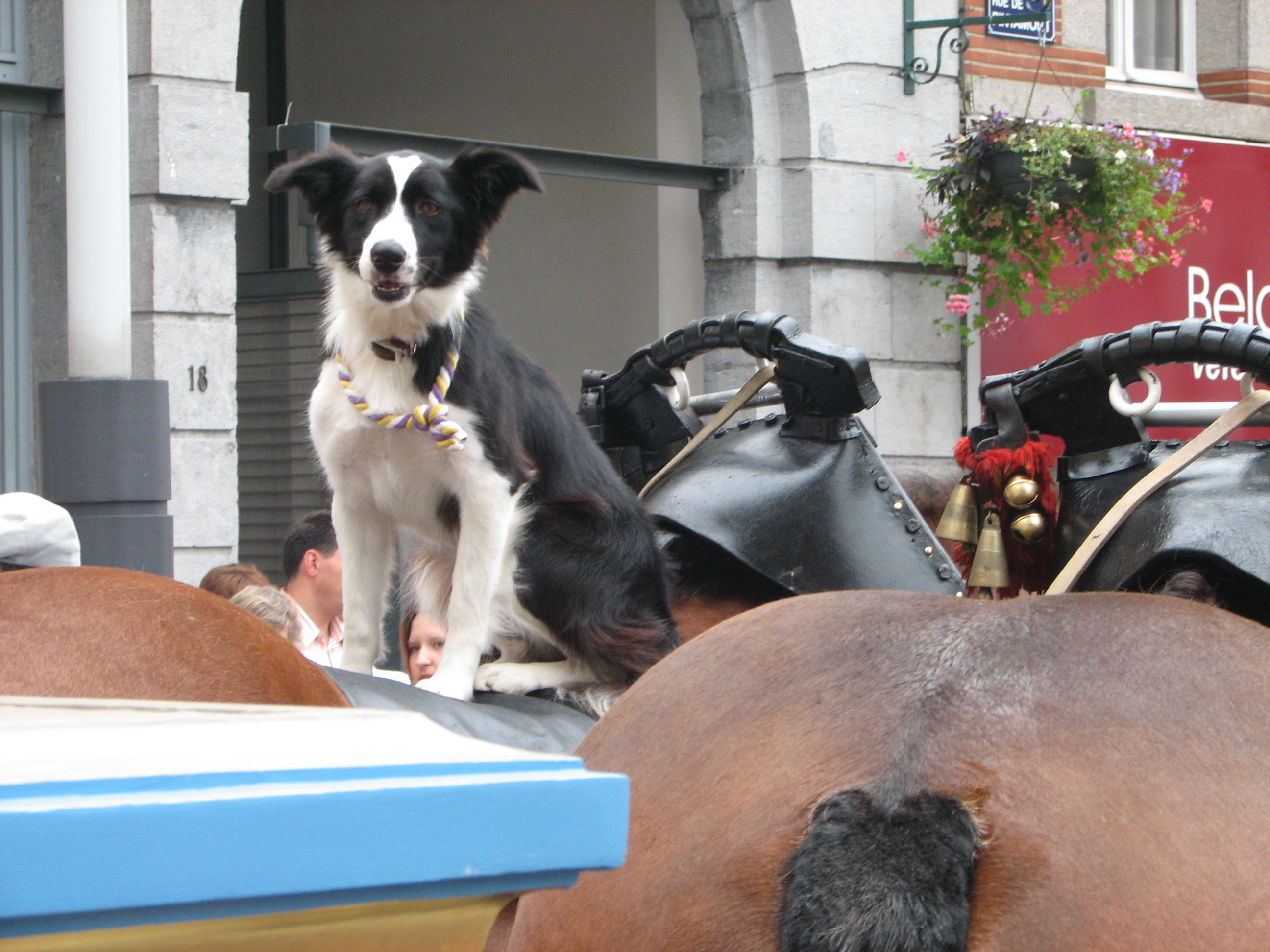 Le chien su un cheval de la ducasse s'Ath